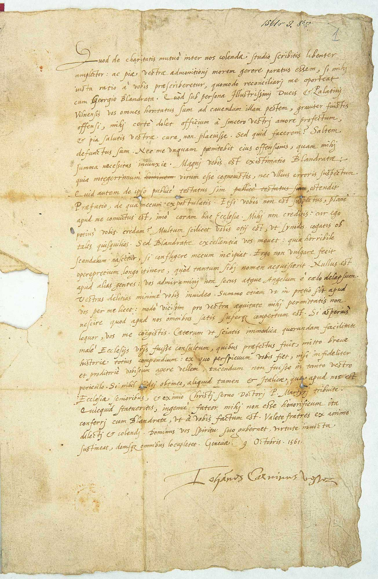 List Jana Kalwina do zboru ewangelicko-reformowanego w Wilnie zawierający potępienie antytrynitarskich poglądów Jerzego Blandraty.